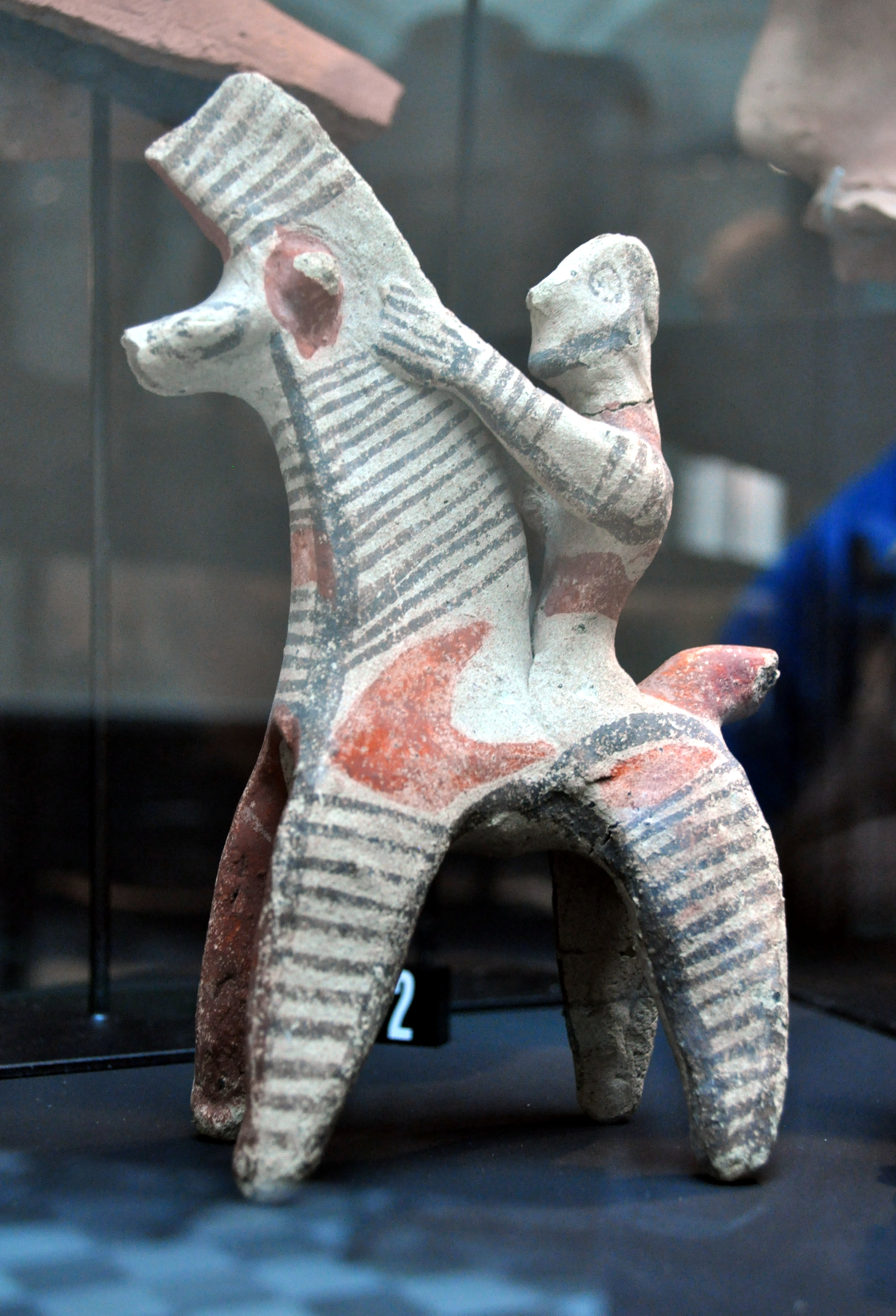 Statyett av häst och ryttare. Terrakotta, Ajia Irini, Amathus. Ca 750 - 480 f.Kr. This is a photo of an artwork at the Mediterranean Museum in Sweden with the identifier: NM Ant 1742